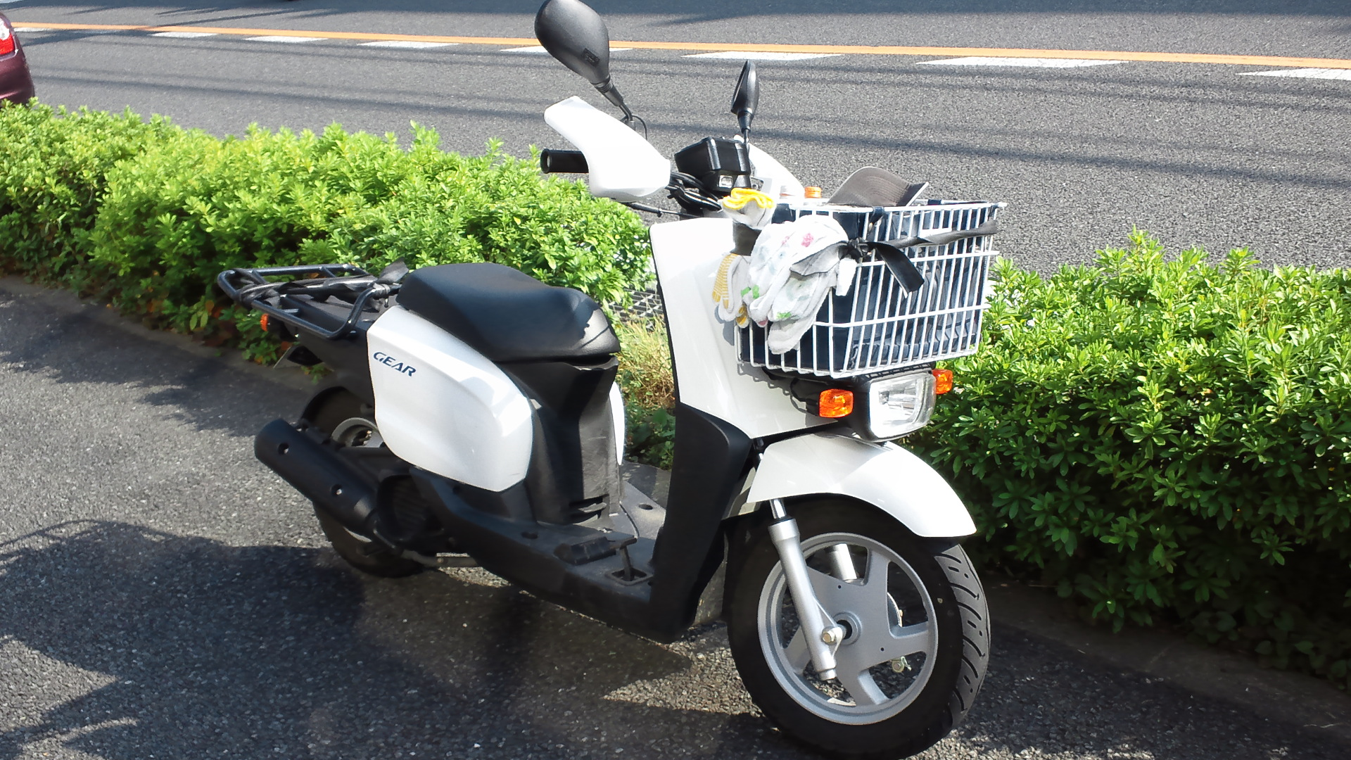 ヤマハ・ギア(2007)。フロントバスケットとナックルガードをオプション装備したニュースギア。